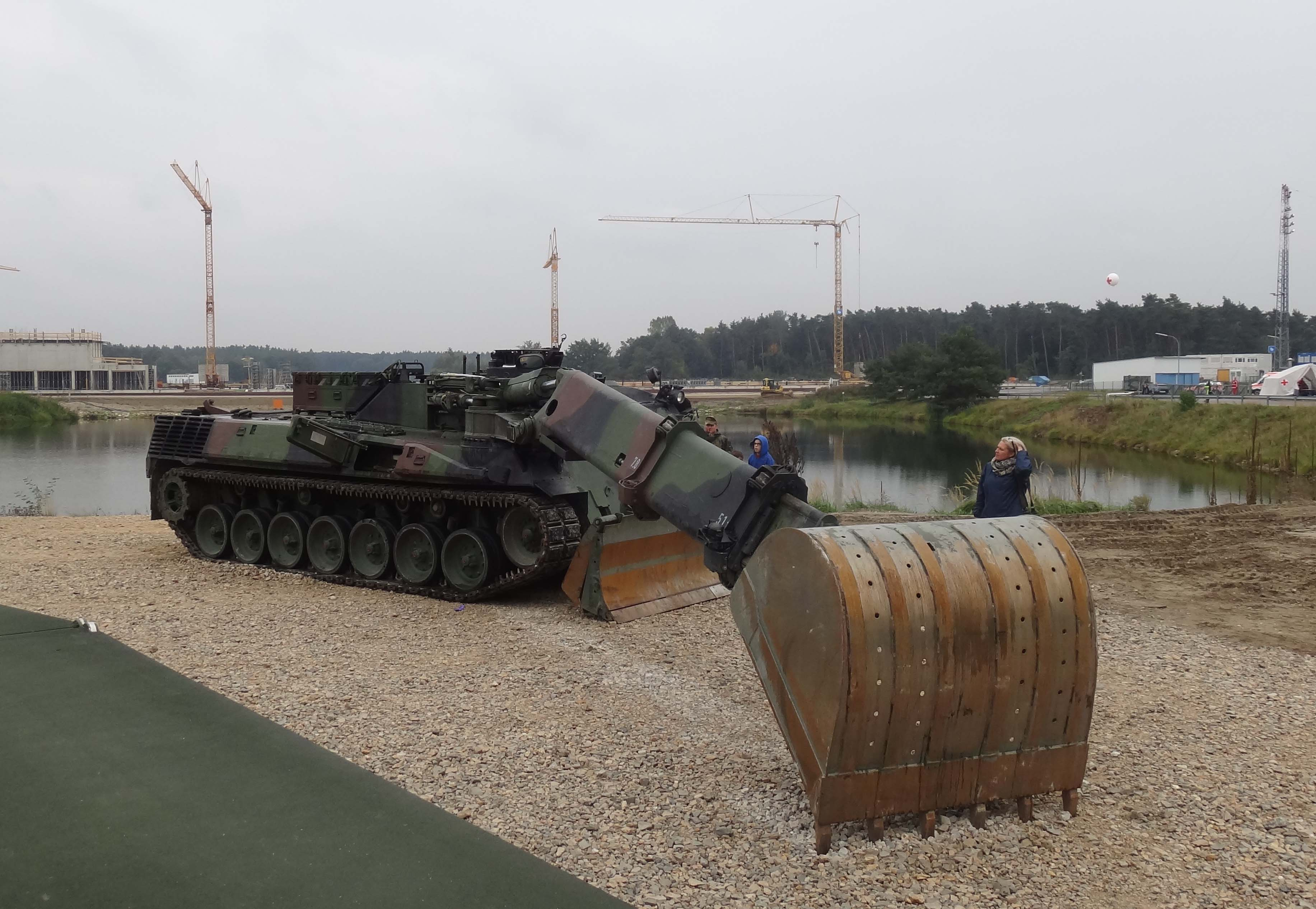 Pionierpanzer Dachs in Manching